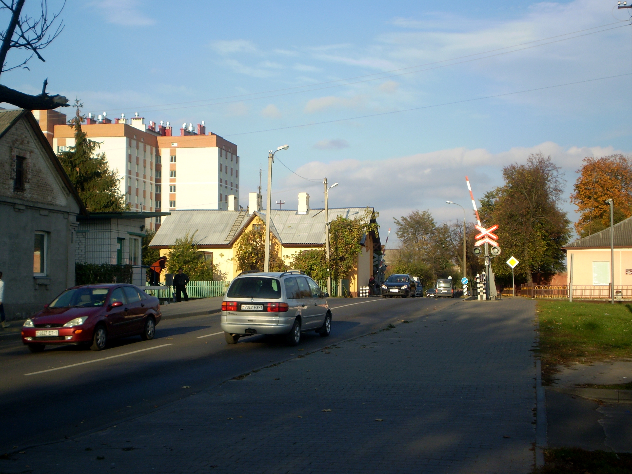 Чыгуначны пераезд